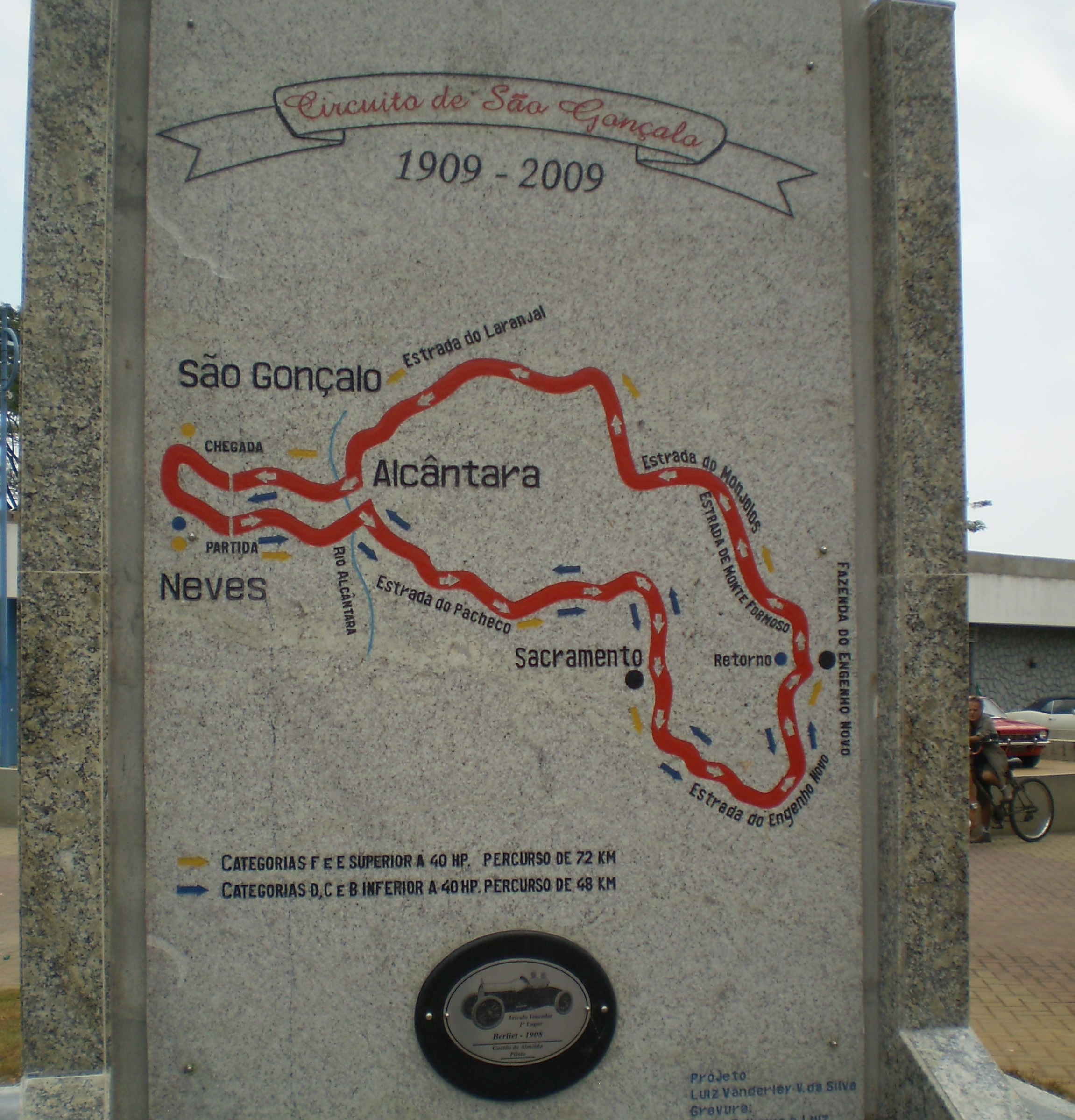 Monumento em alusão a primeira corrida de automóveis do Brasil que ocorreu em Neves em 1909.